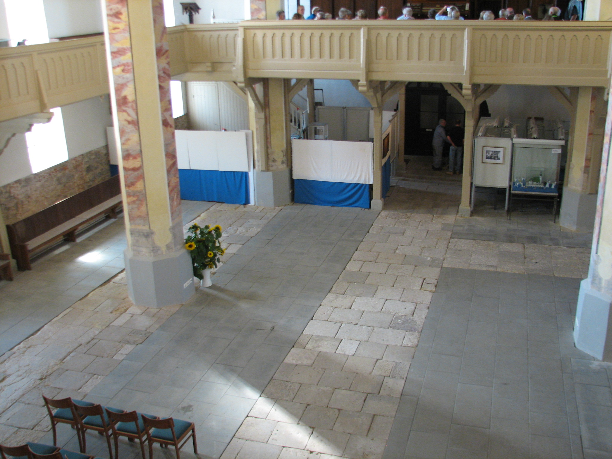 Das leere Kirchenschiff, gelegentlich Ort für Ausstellungen - auf der Empore die Orgel (Ausschnitt)